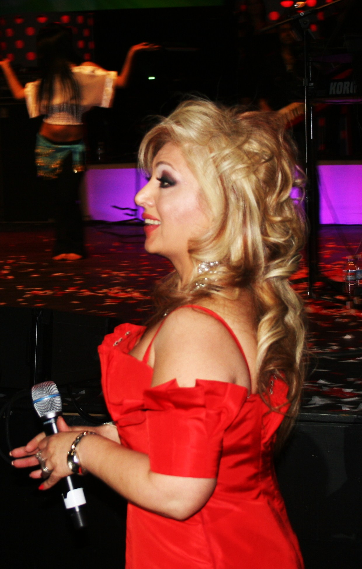 لیلا فروهر .